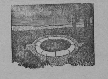 Il·lustració Art Jove. Seguida als Sonets a la somniada, de Gaballí.